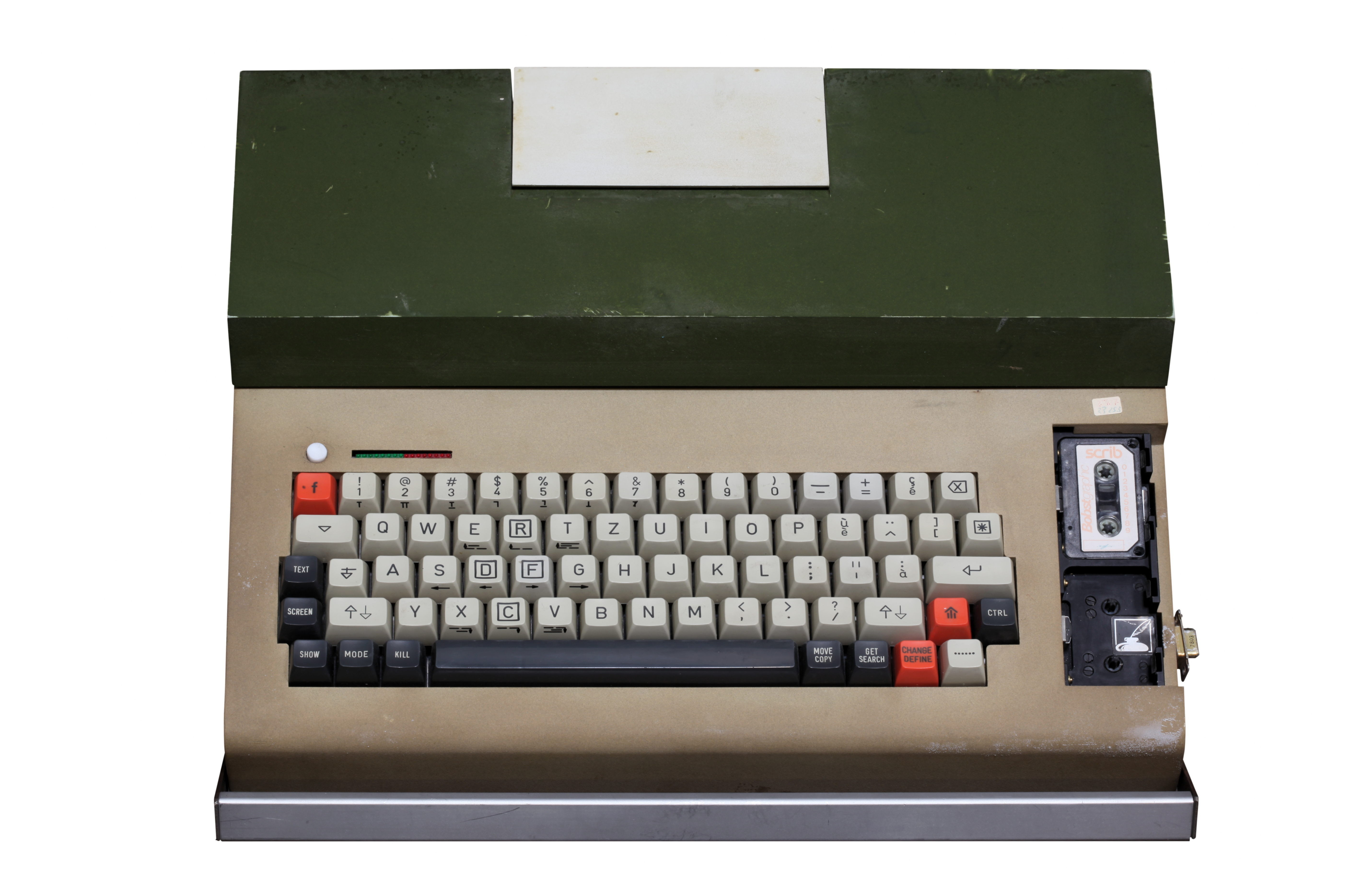 Scrib Portable computer. On display at the Musée Bolo, EPFL, Lausanne.